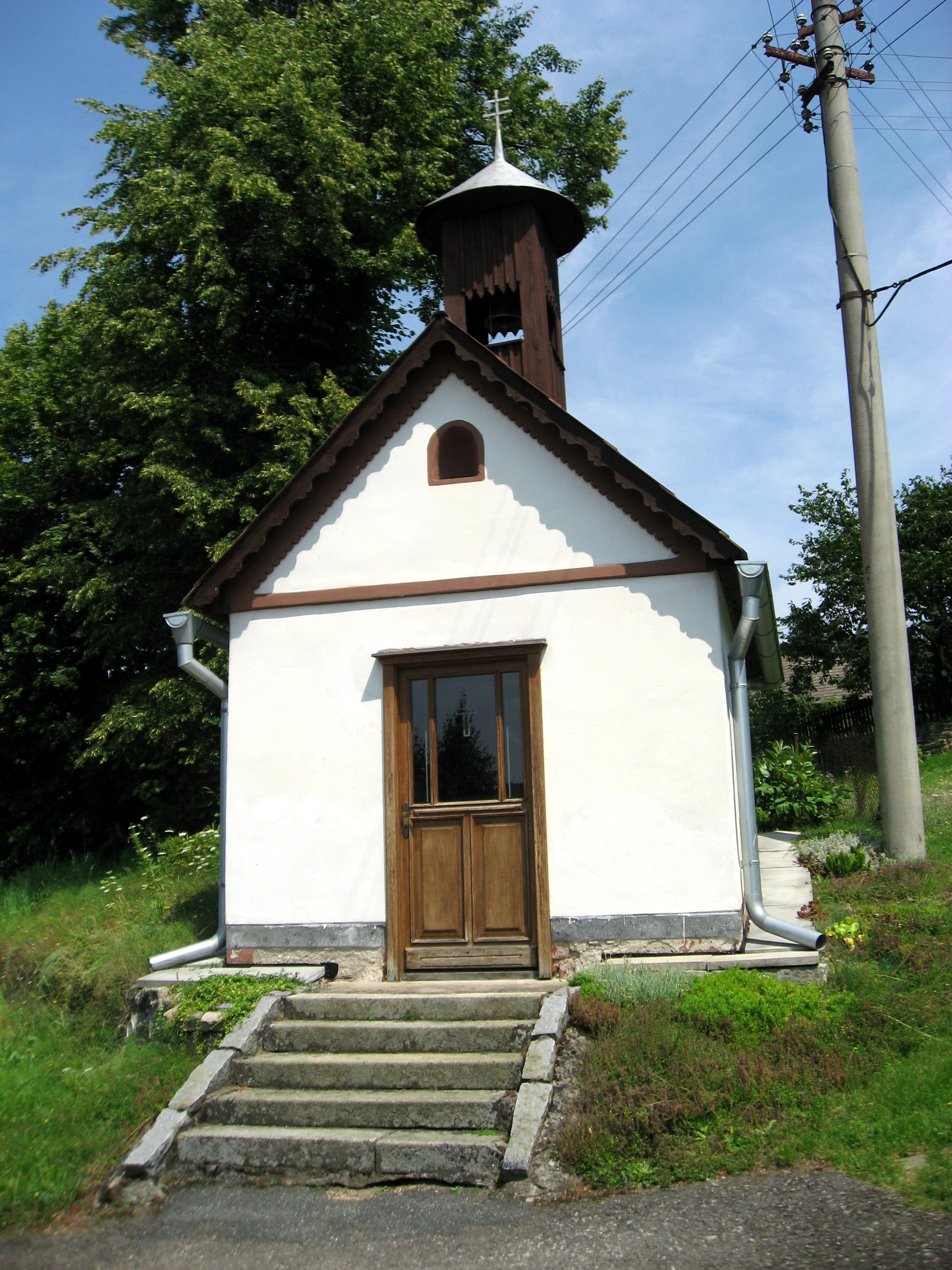 Leštinka, kaple